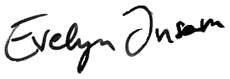 Firma autografa della saltatrice con gli sci italiana Evelyn Insam. Foto originale modificata da me: trasformata in bianco e nero, luminosità ridotta, contrasto aumentato, sfondo sbiancato.